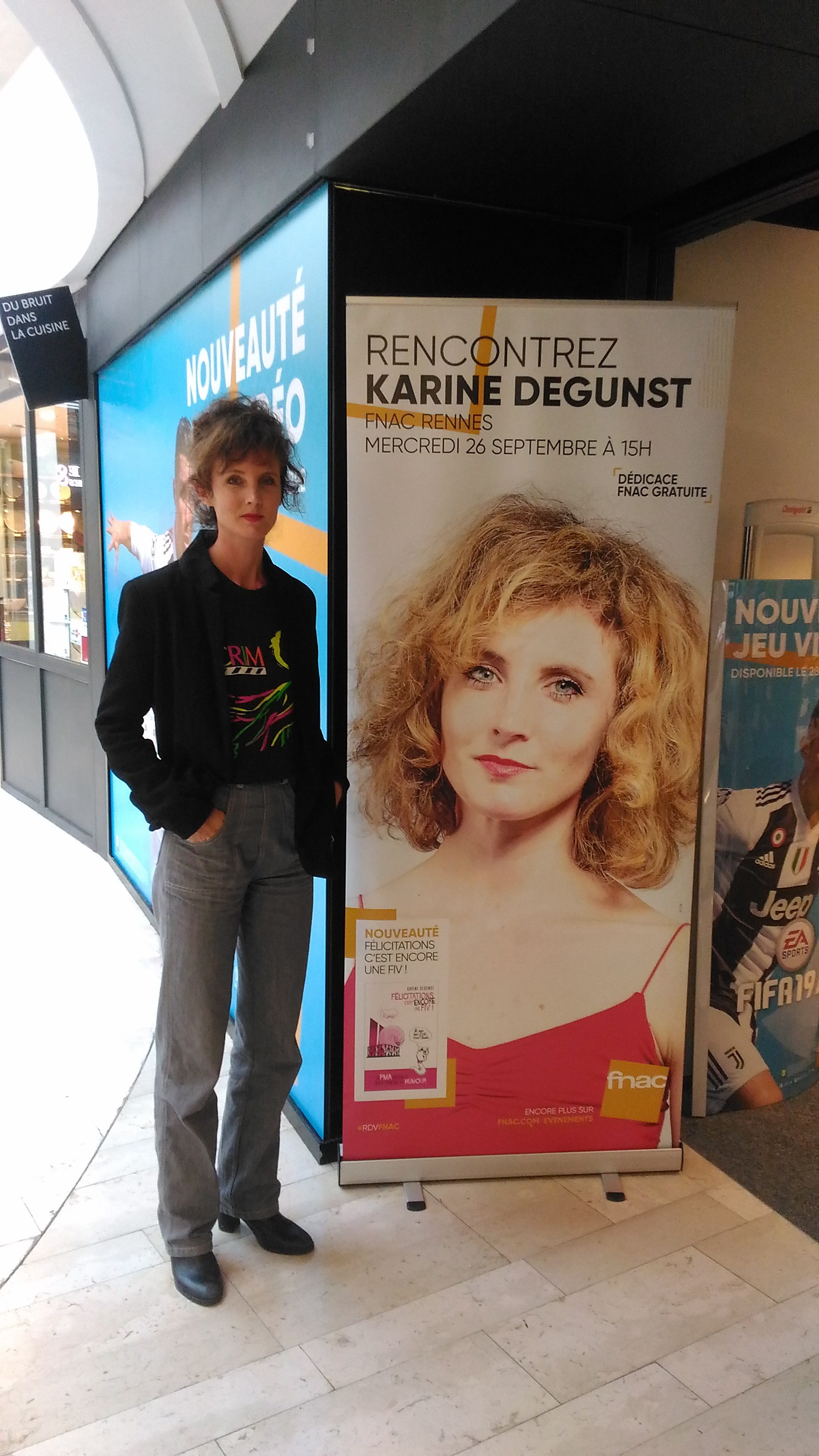 Dédicace Fnac pour "Félicitations, c'est encore une FIV!"